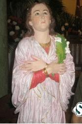 imagem de Santa Maria Goretti vanerada na Capela de Santa Maria Goretti, em Currais Novos- RN- Brasil